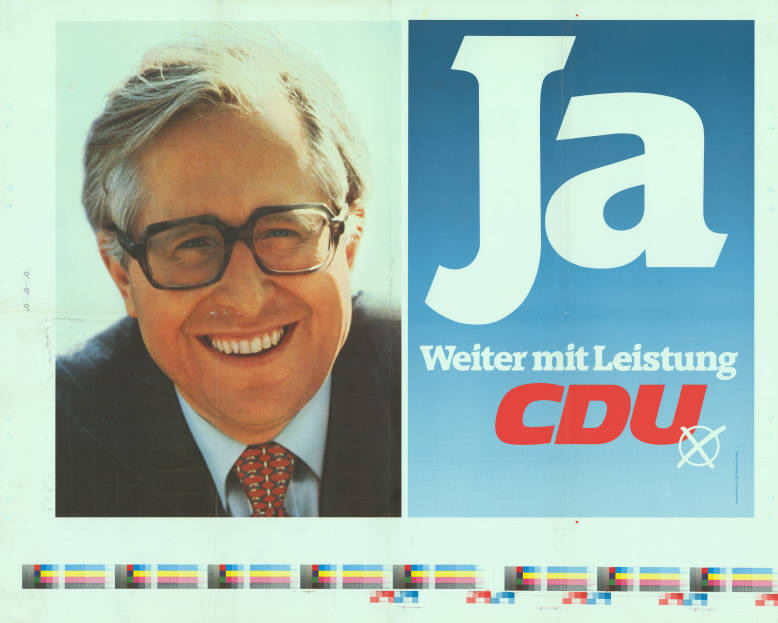 Ja Weiter mit Leistung CDU Abbildung:Porträtfoto - StimmkreuzPlakatart:Kandidaten-/Personenplakat mit PorträtAuftraggeber:Verantw.: CDU Rheinland-PfalzObjekt-Signatur:10-010 : 452Bestand:Landtagswahlplakate Rheinland-Pfalz (10-010)GliederungBestand10-18:Landtagswahlplakate Rheinland-Pfalz (10-010) » CDULizenz:KAS/ACDP 10-010 : 452 CC-BY-SA 3.0 DE